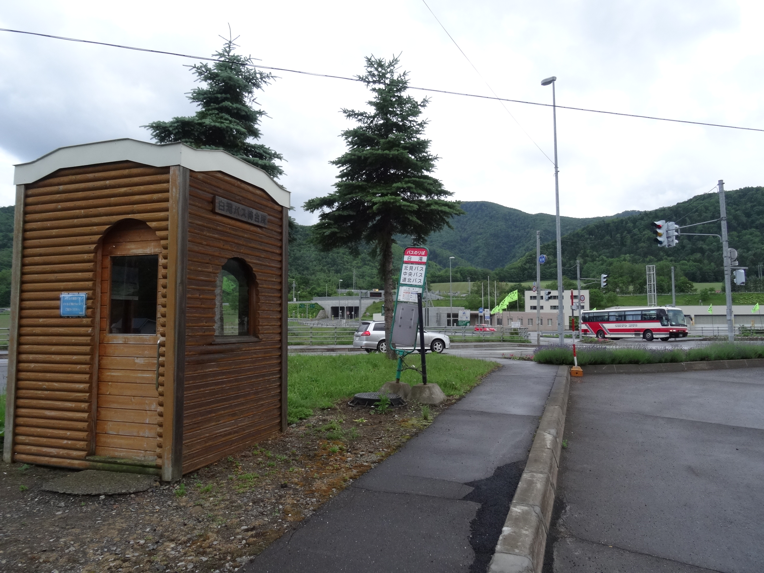 "Shirataki" Bus stop